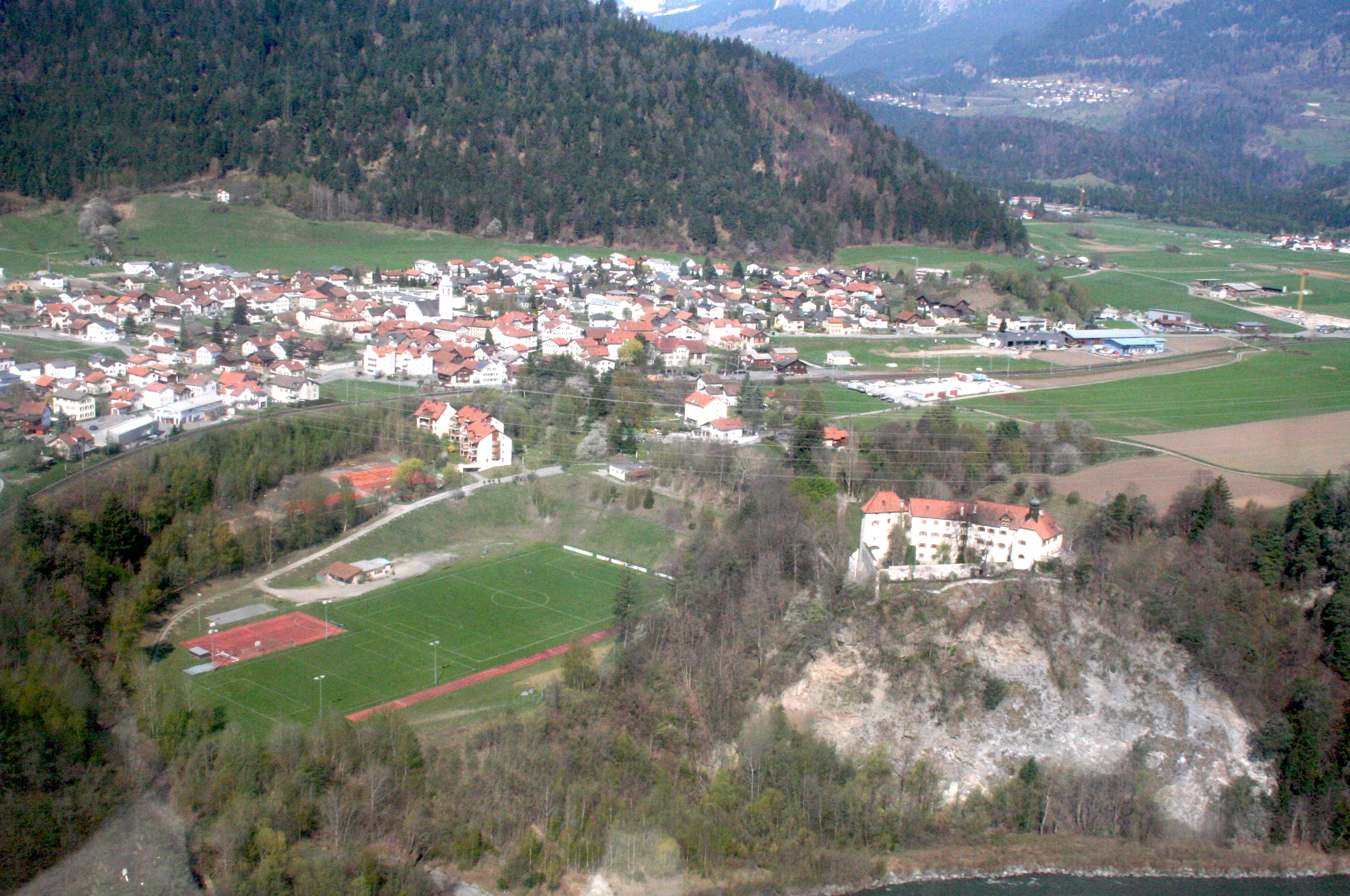 Rhäzüns mit Schloss Rhäzüns